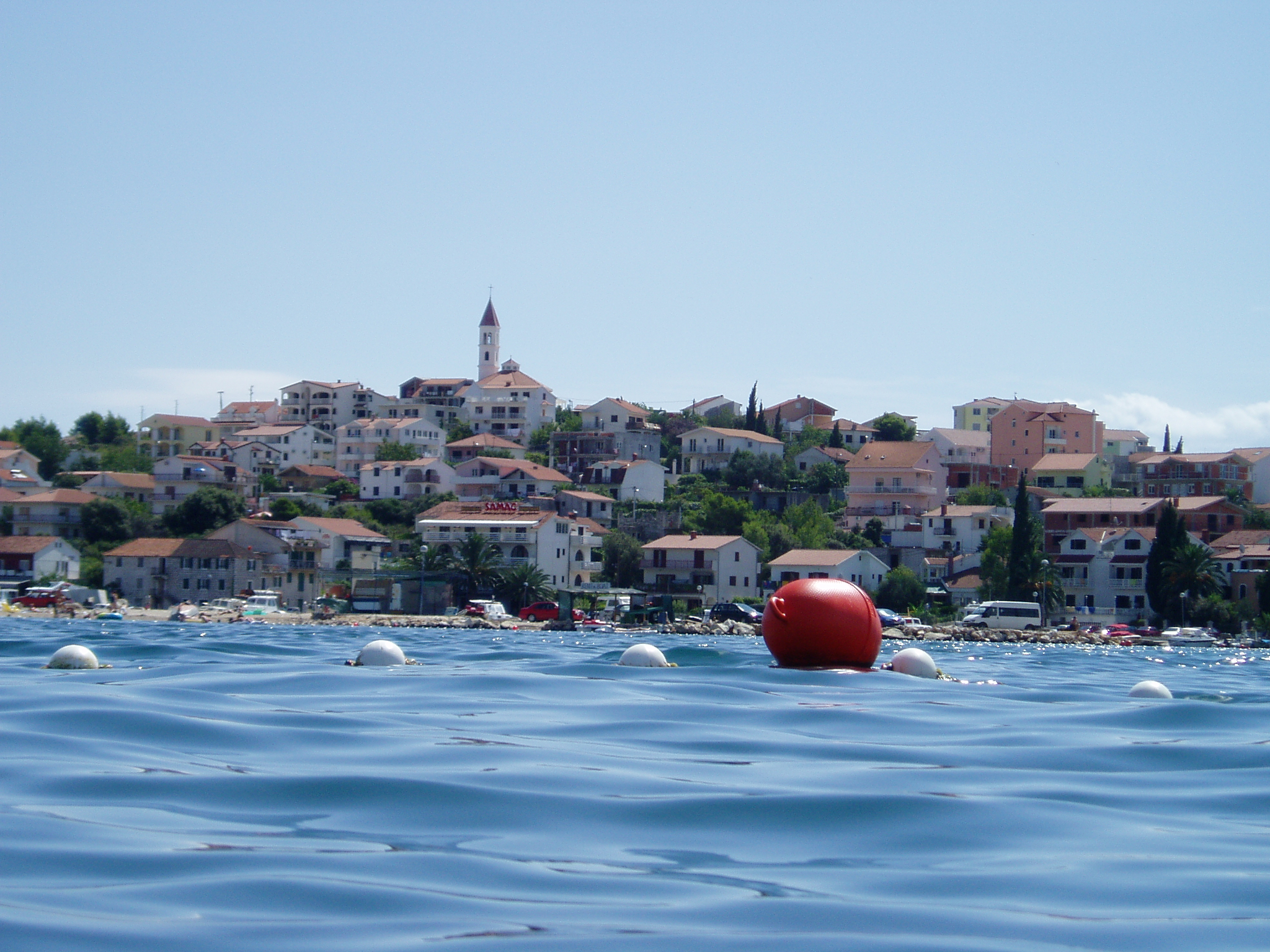 Seget Vranjica - Vista dal mare